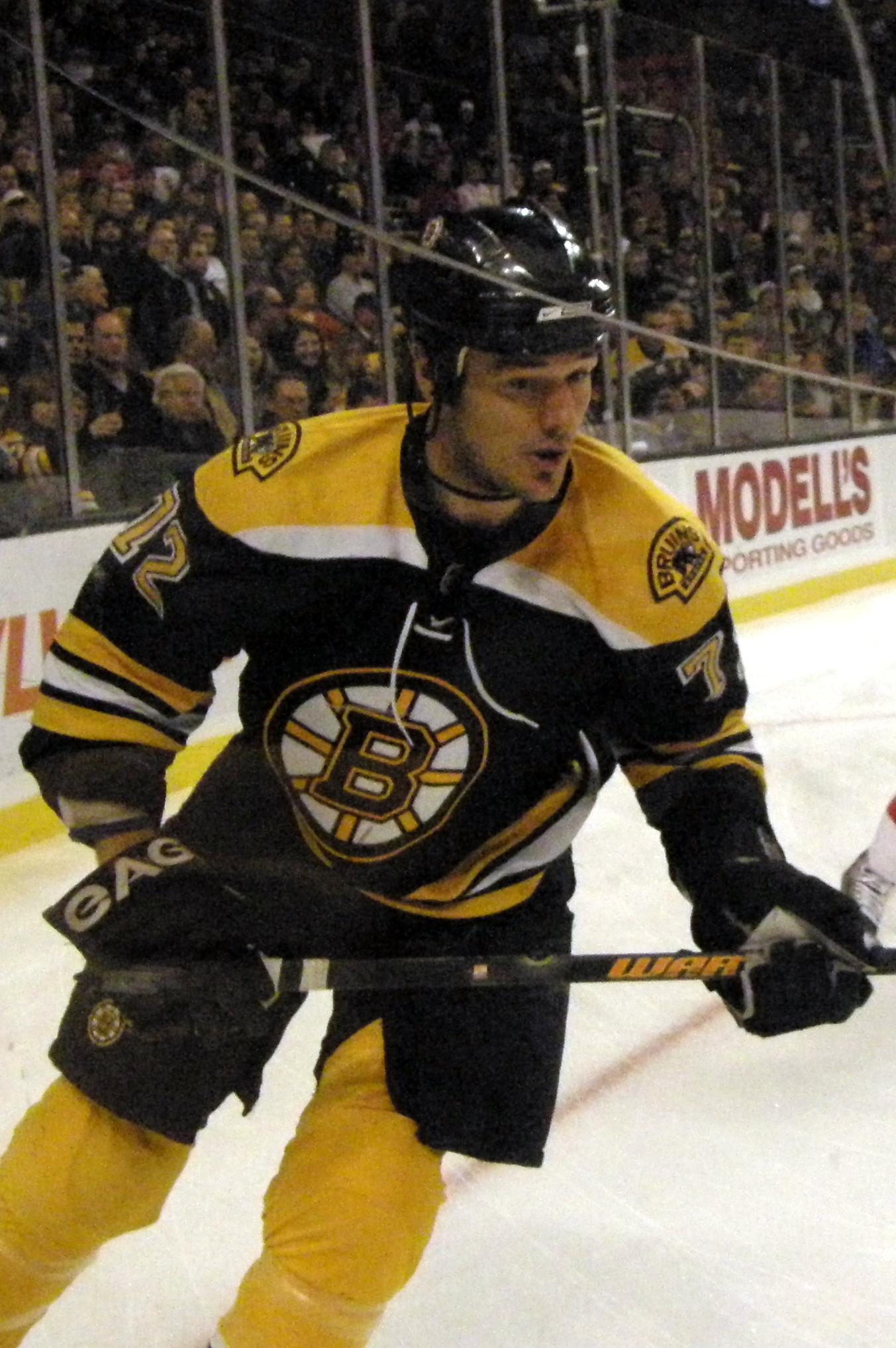 72 Peter Schaefer (LW)